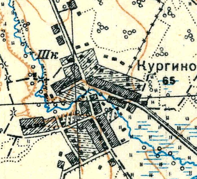 Топографическая карта Ленинградской области, квадрат О-36-25-А-б (Дружная Горка), деревня Кургино